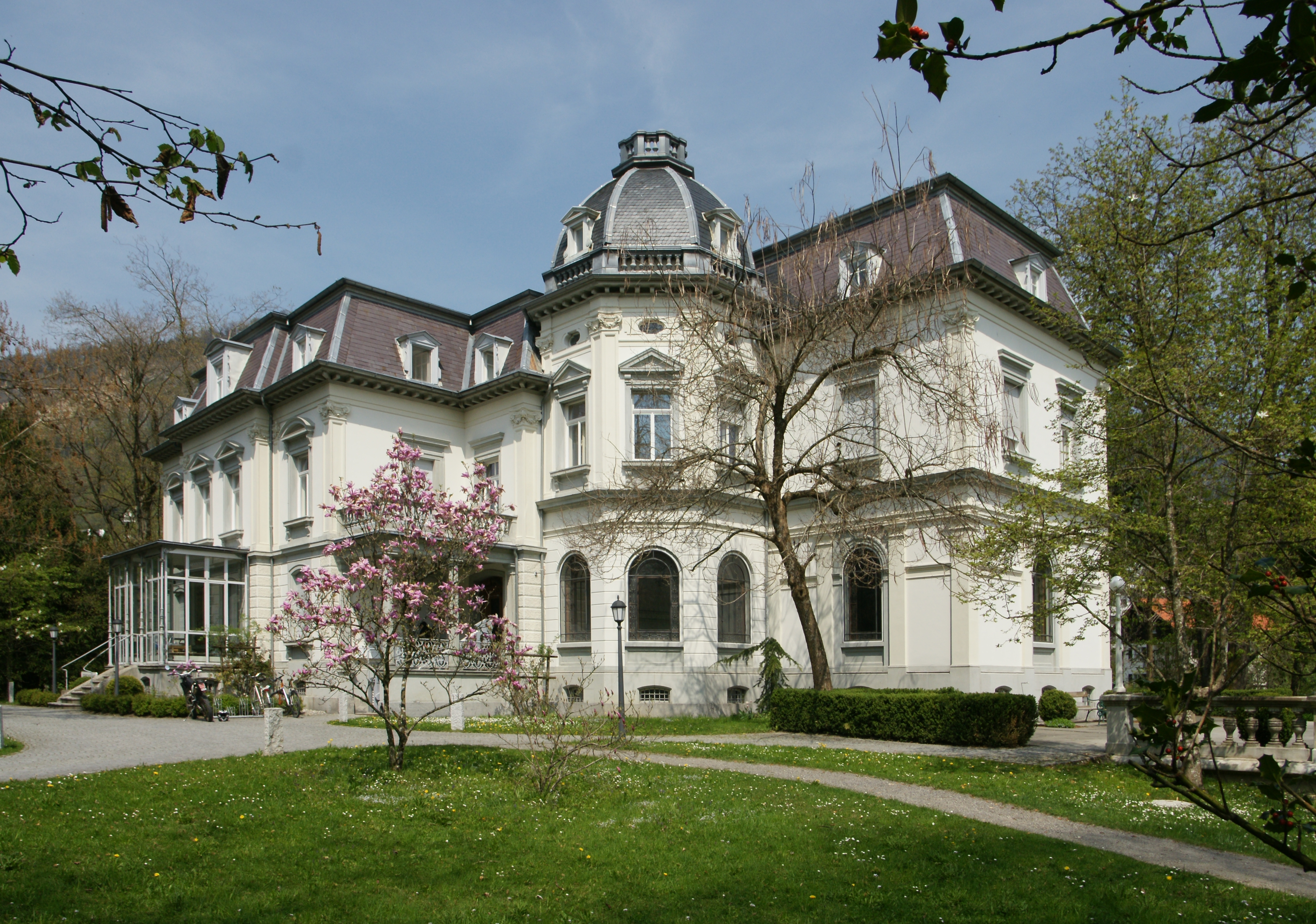 Die Villa Grünau, erbaut 1887 im Stil des Historismus mit Mansarddach und Turmerker in Kennelbach. Hier wohnte Friedrich Wilhelm Schindler mit seiner Gattin Maria Margaretha Verena Jenny Schindler.